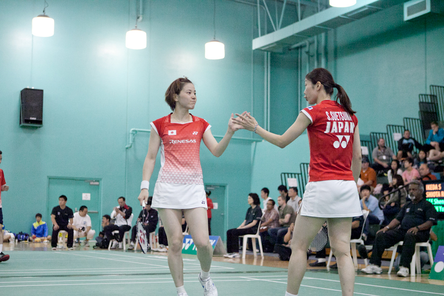 Miyuki Maeda and Satoko Suetsuna